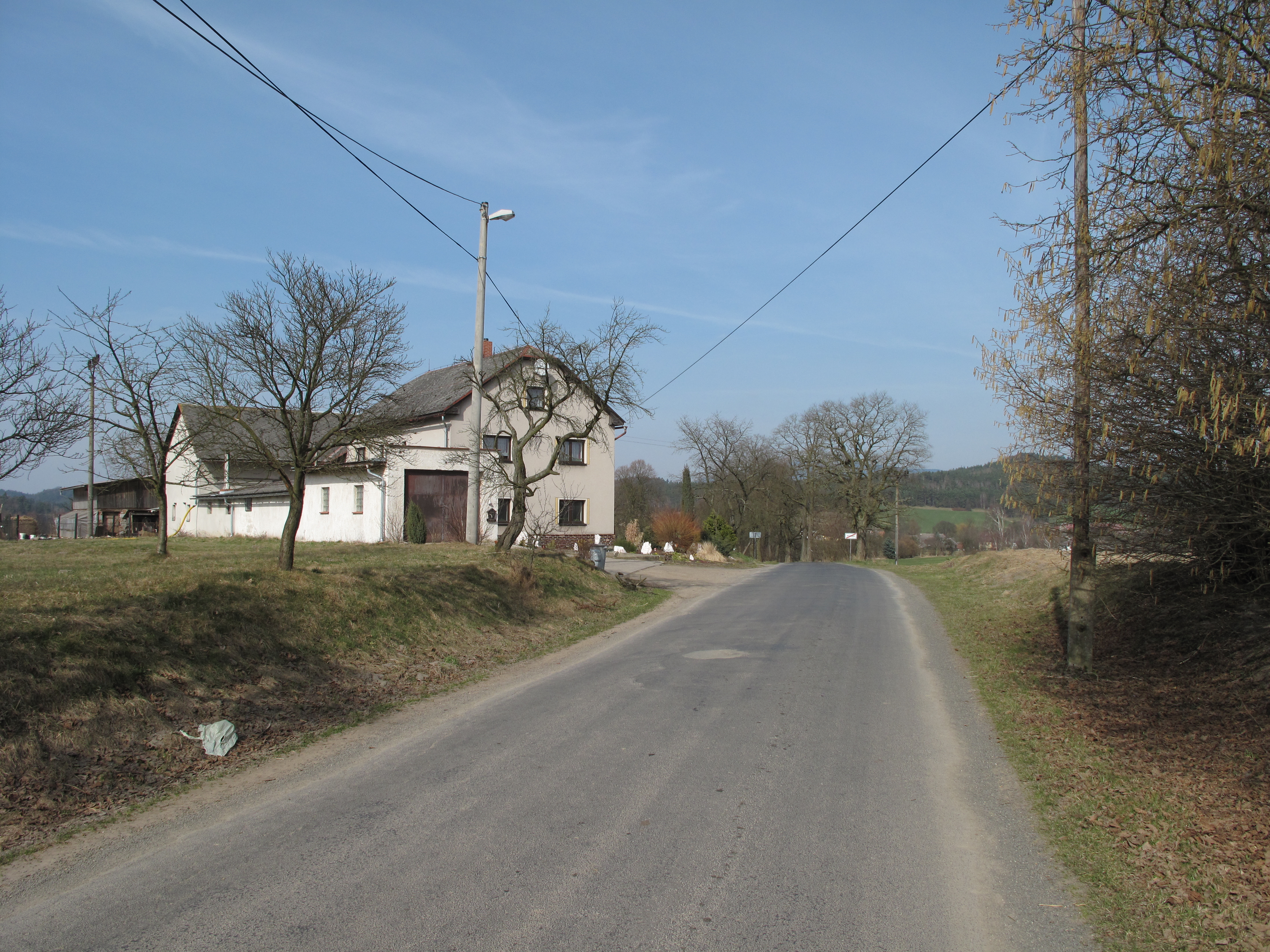 Dům ve Vystrkově. Okres Liberec, Česká republika.